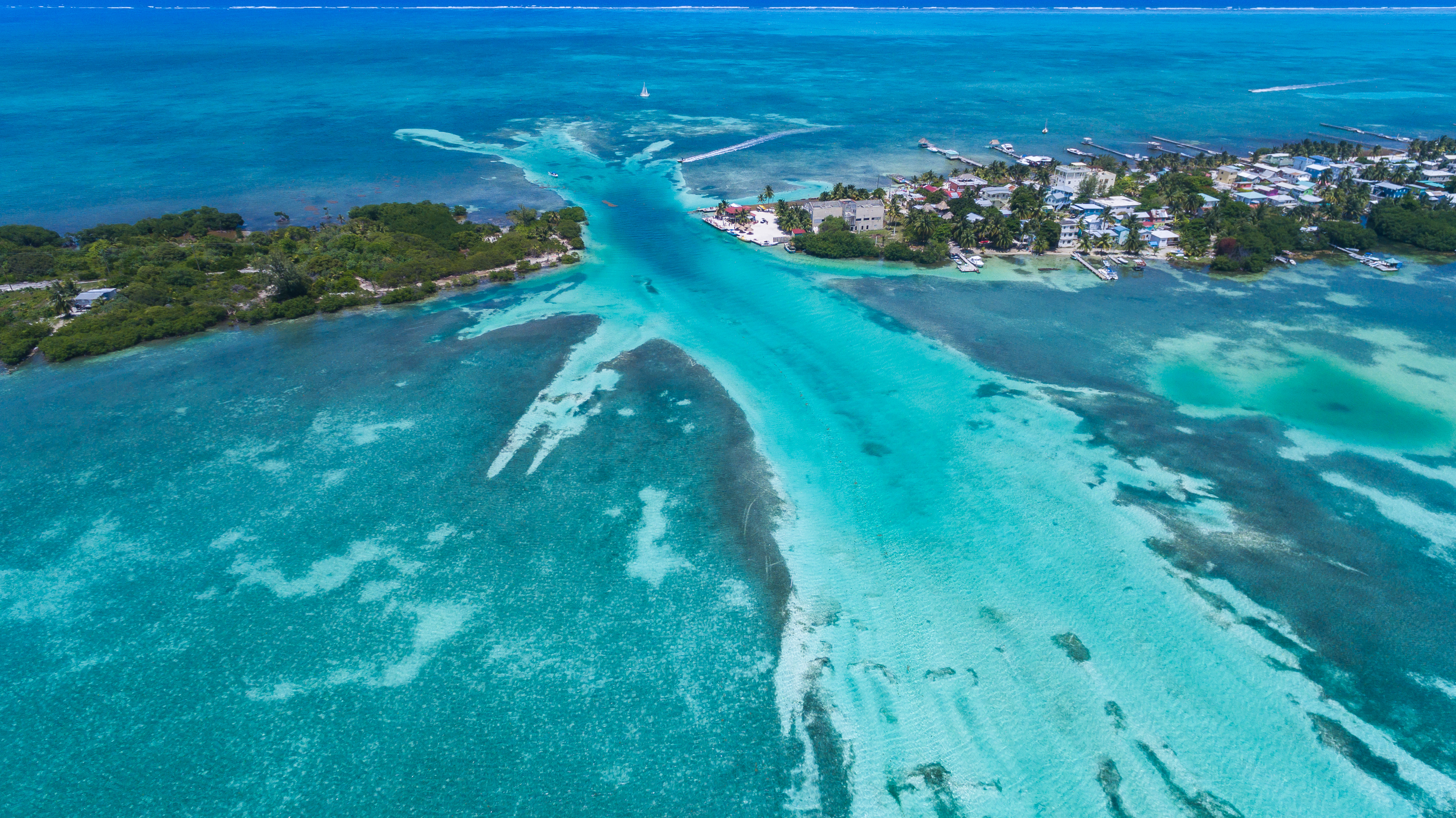 beautiful island in Belize, Caye Caulker